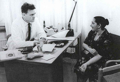 John Takman